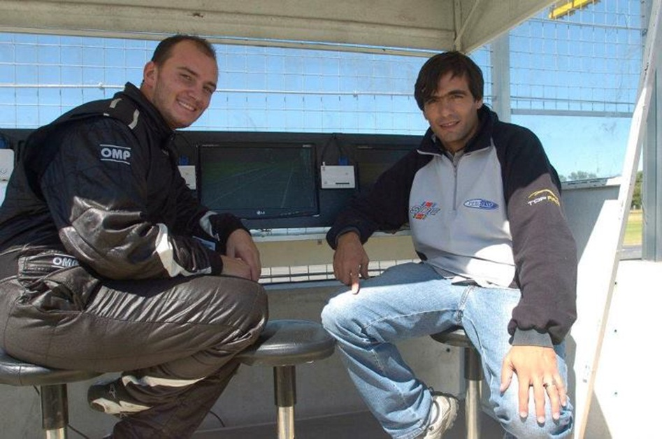 Fotografía de los pilotos argentinos de Top Race, Facundo Della Motta (campera negra) y Marcos "Mudo" Vazquez (remera gris).